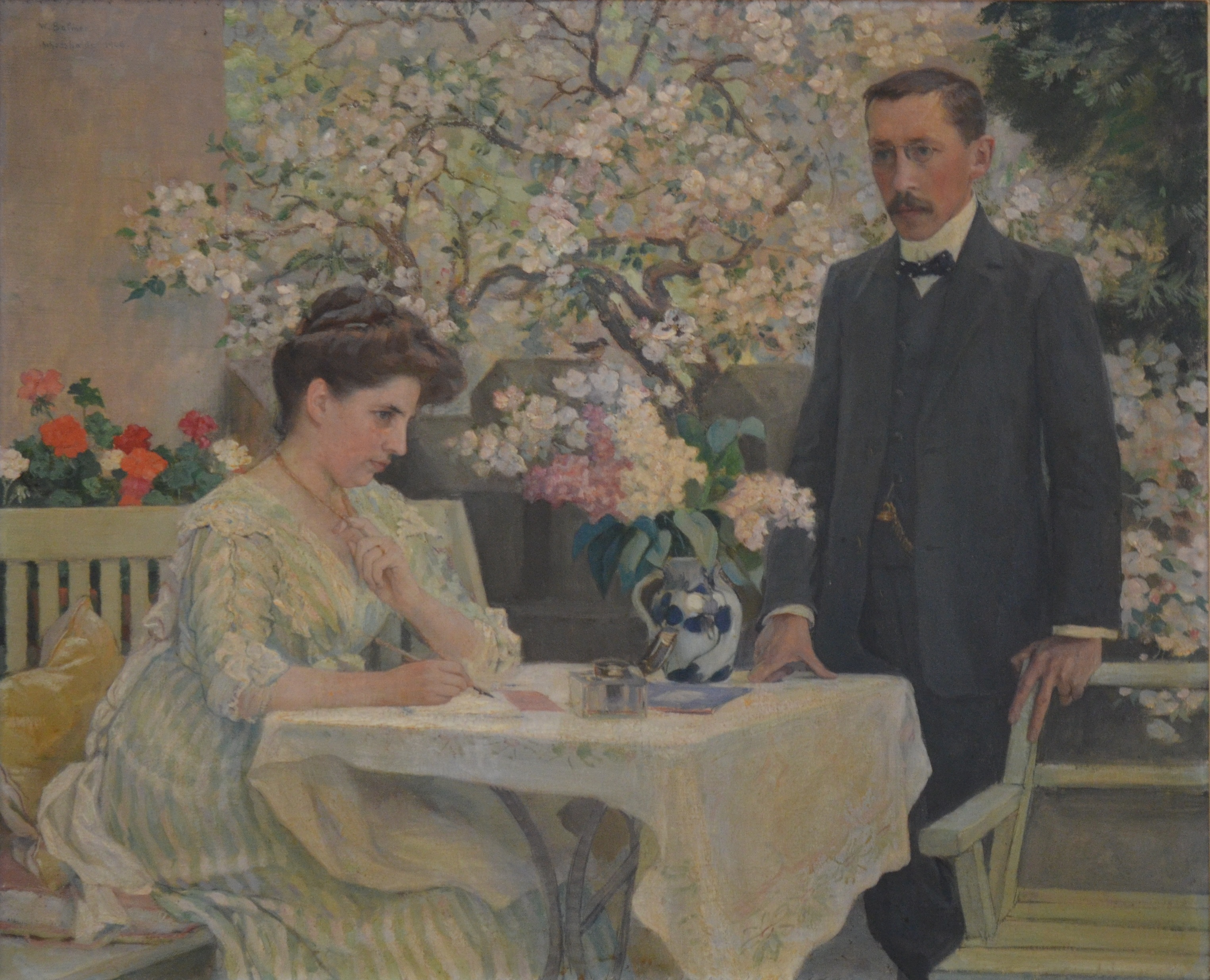 Wilhelm Balmer, Adèle und Rudolf von Tavel-Stettler, 1909.